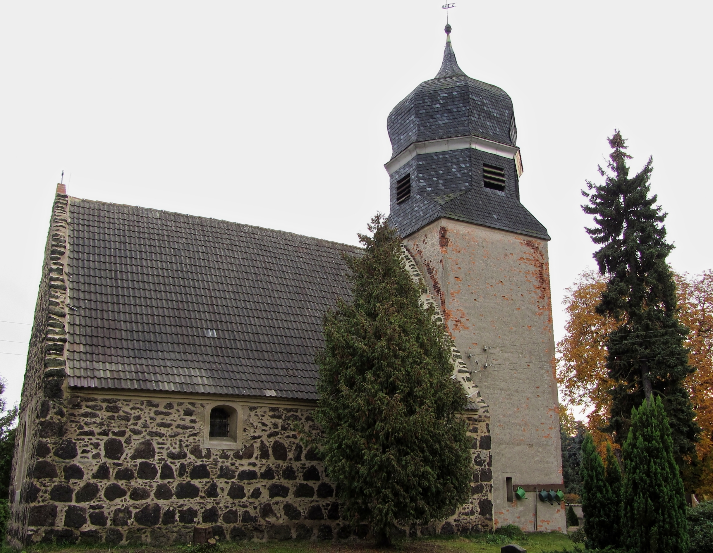 Dorfkirche von Frauenhorst, Herzberg (Elster), Brandenburg